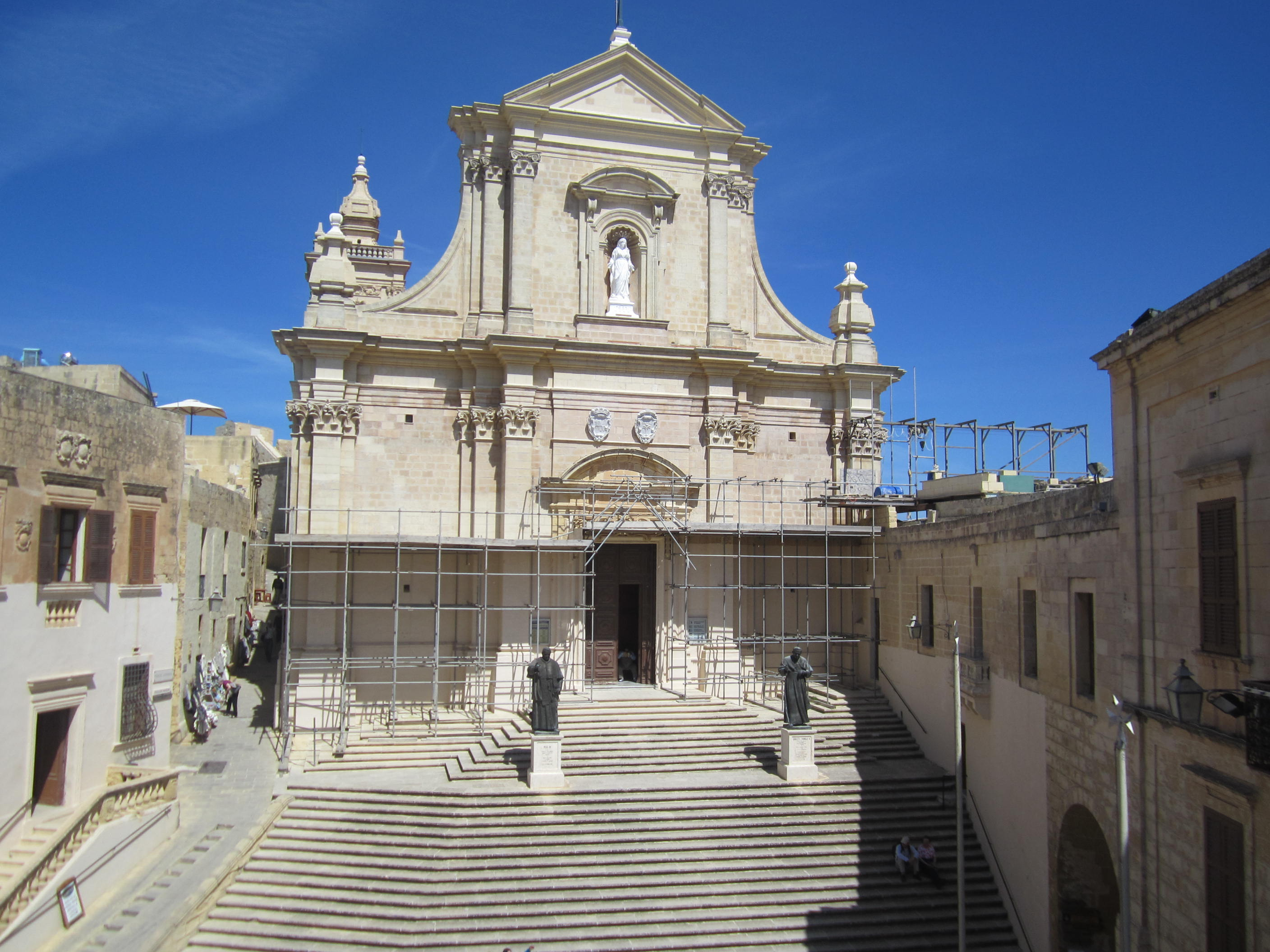 Duomo di Santa Maria Assunta a Victoria (Gozo)